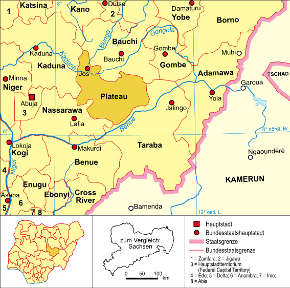 Politische Karte Nigerias (Bundesstaat Plateau hervorgehoben)